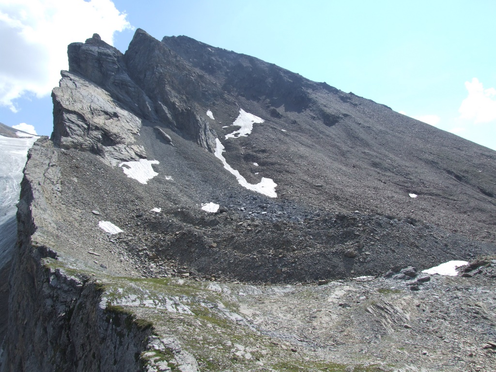 Aktiver Blockgletscher, Lärmstange Scharte, Zillertaler Alpen, Tuxer Hauptkamm.